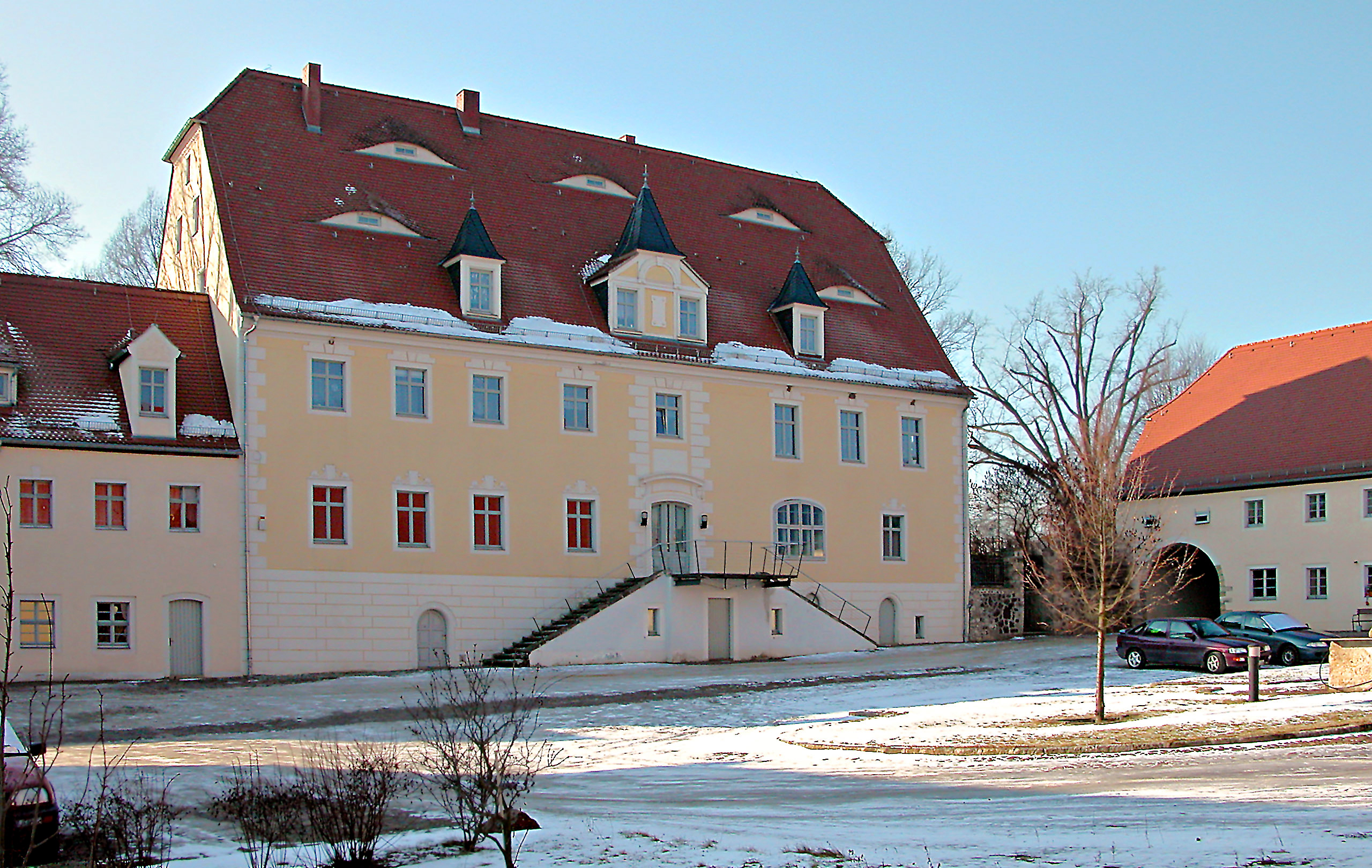 28.01.2006 01665 Leutewitz (Käbschütztal): Das Herrenhaus des ehem. Rittergutes Leutwitz geht auf das 17. Jh. zurück, wurde im 18. Jh. barockisiert und 1895 nochmals überformt. 1998 restauriert. [DSCN8586.TIF]20060128050DR.JPG(c)Blobelt